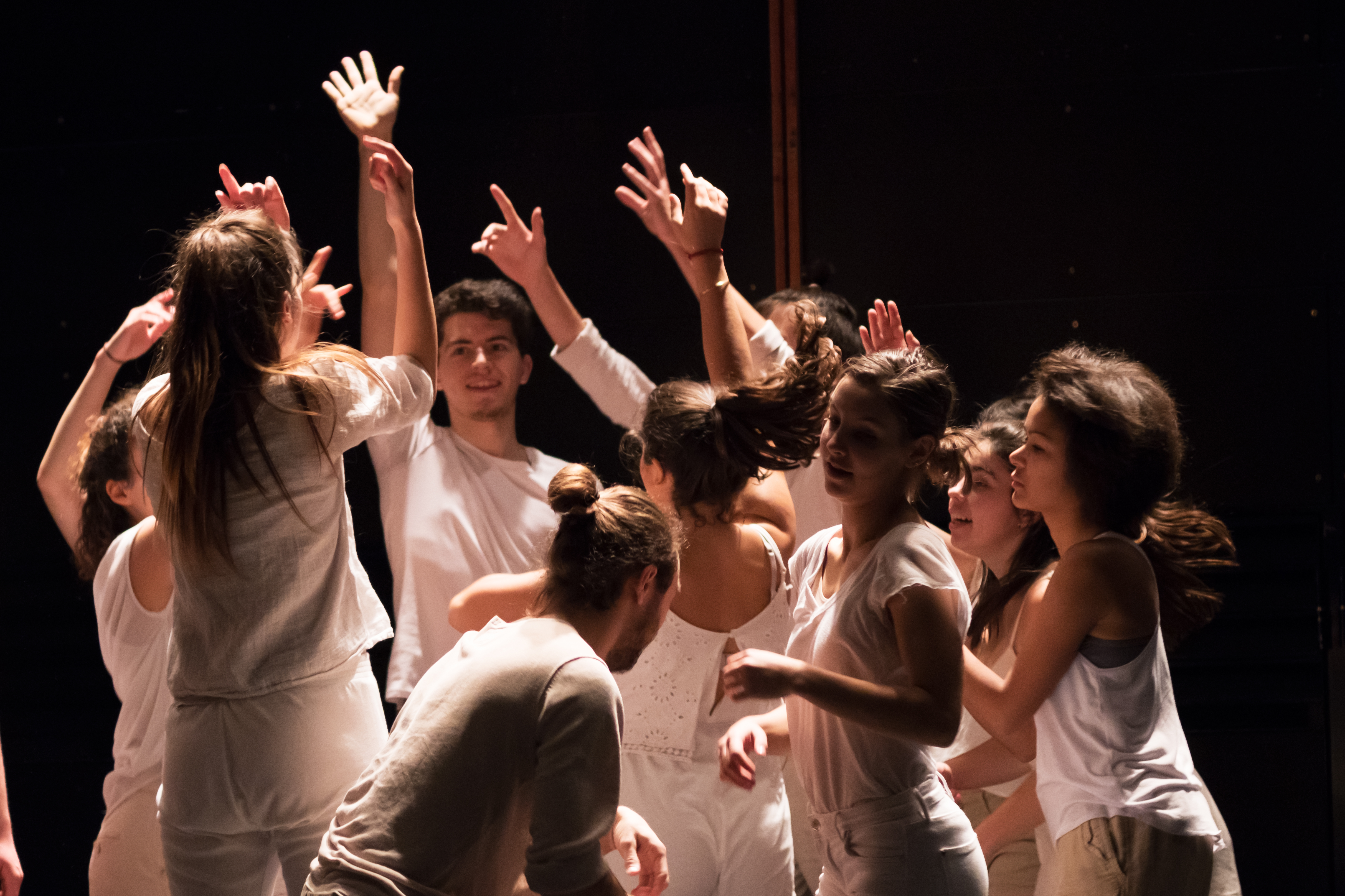 Description